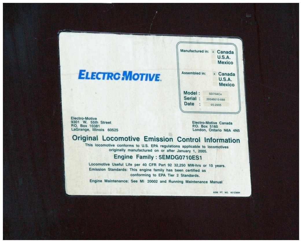 EMD SD70ACe Label